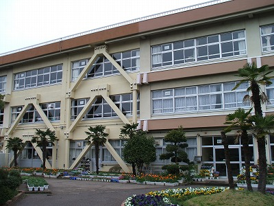 柏市立柏第七小学校校舎（正門側）